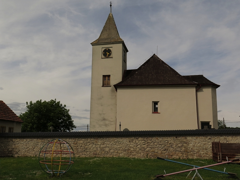 Kostel svatého Lukáše, Suchodol.